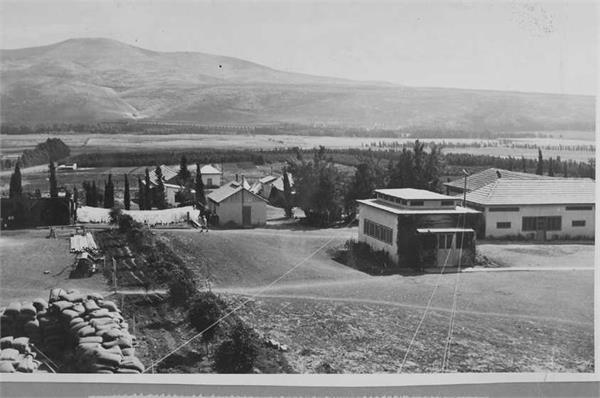 גבע - מראה